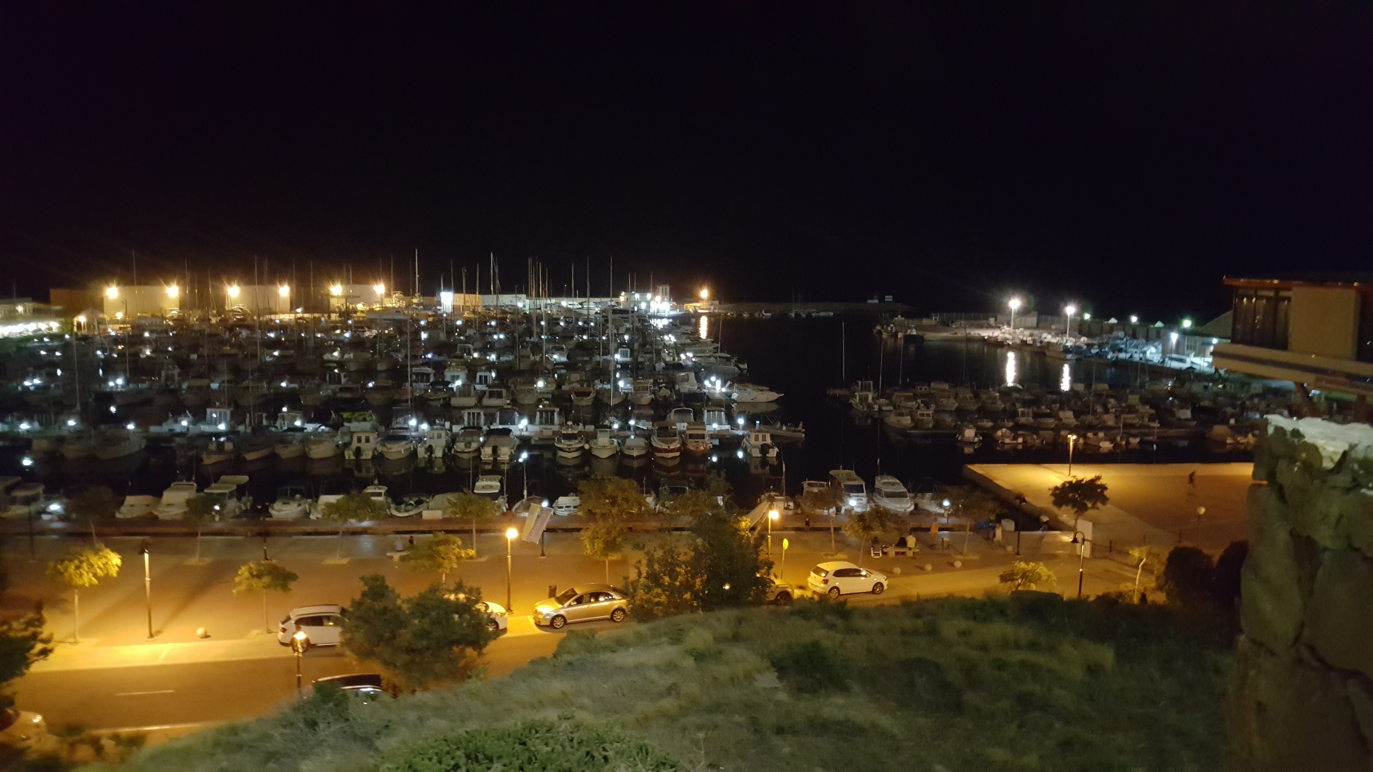 Puerto de El Campello (Alicante) de noche.